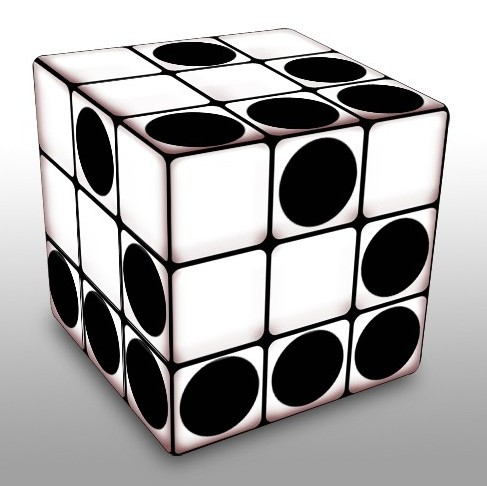 Glider in versione cubo di rubik creata online con